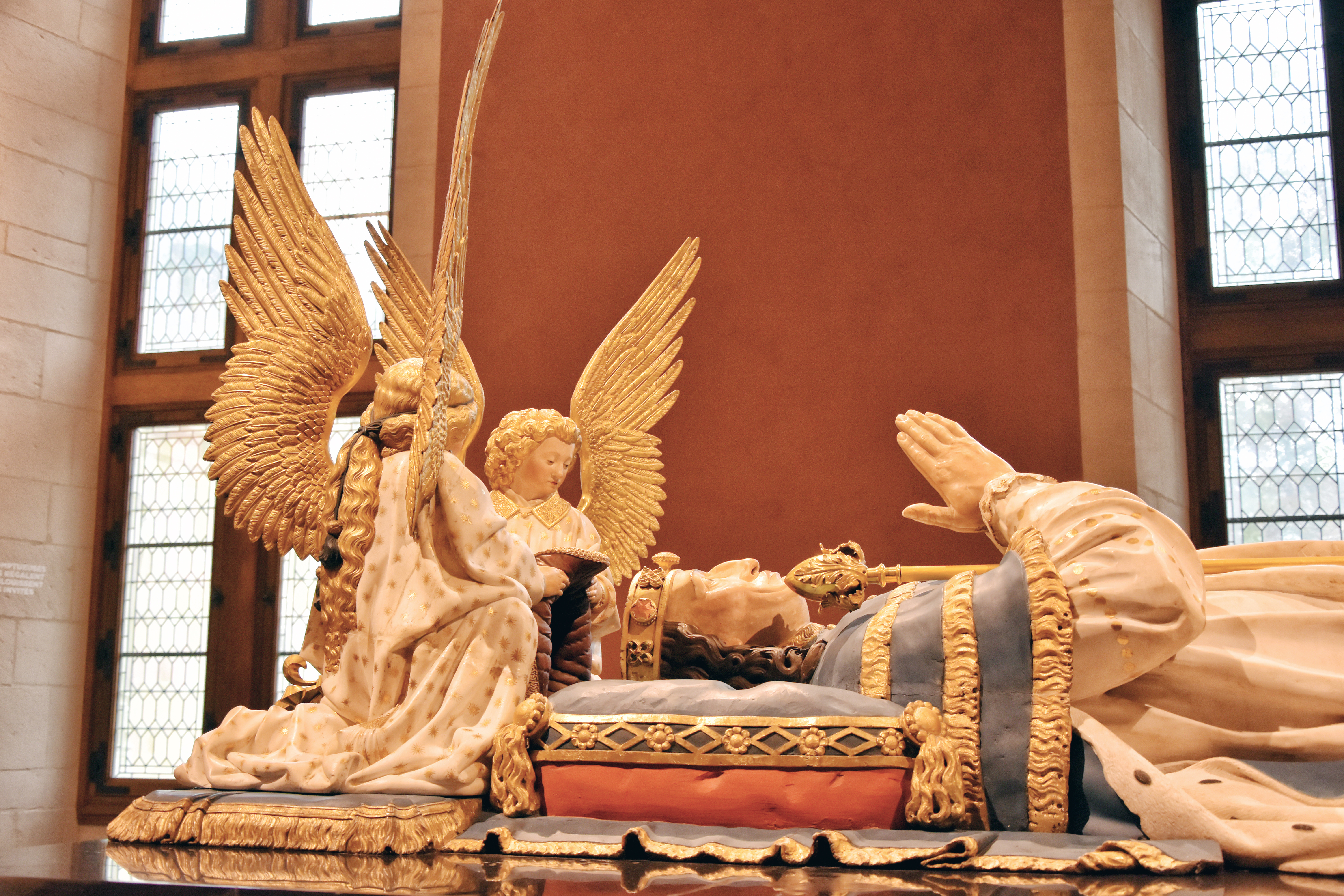 Musée des beaux-arts de Dijon - Praalgraf van Filips de Stoute